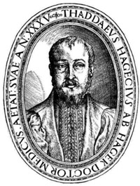 Czech astronomer Tadeáš Hájek z Hájku, (Thaddaeus Hagecius ab Hayek or Thaddeus Nemicus)